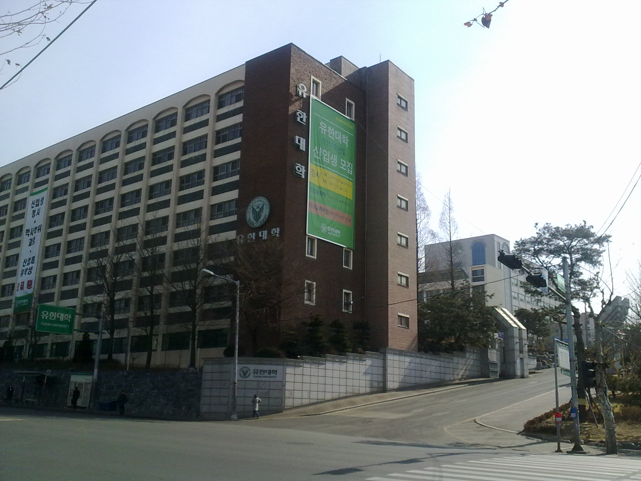 유한대학 정문과 건물